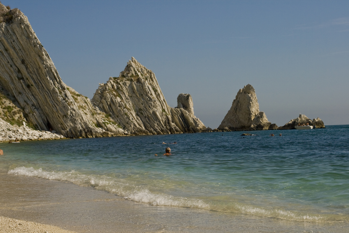 Scogli delle Due Sorelle a Sirolo, Italy.